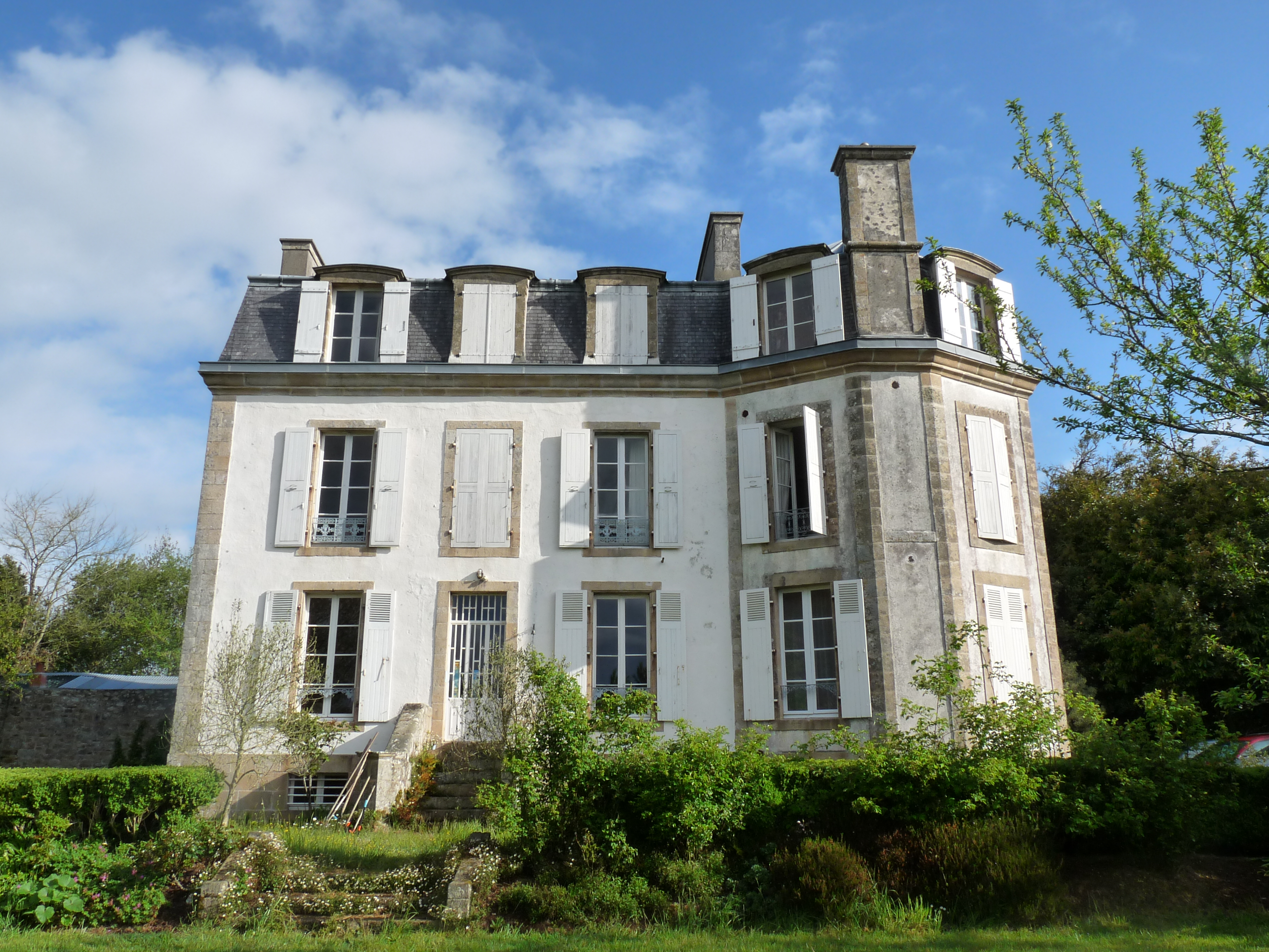 Manoir de Suguensou (19e siècle) sur la commune d'Esquibien (Finistère), transformé en chambres d'hôtes